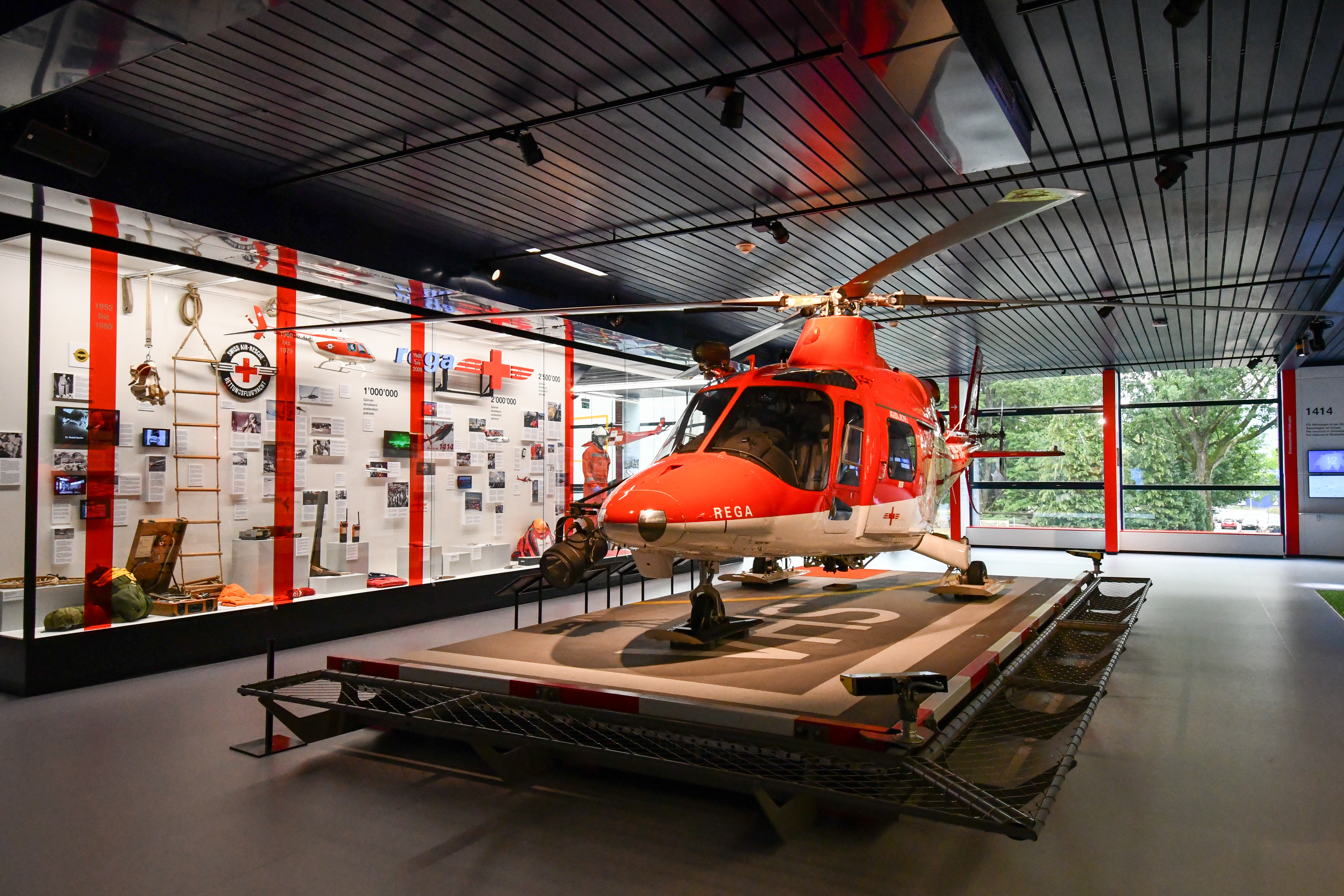 Ein Rega-Helikopter (Agusta A109 K2 (HB-XWG) im Verkehrshaus in Luzern.